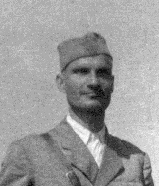 Arso Jovanović, ritaglio da File:Arso Jovanović, Mitar Bakič and Ivan Milutinović.jpg.